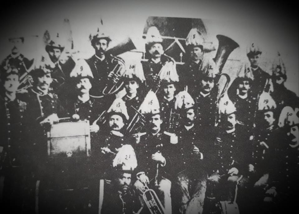 La Filarmonica di Bondeno diretta da Enrico Mori. Anno 1888 circa.